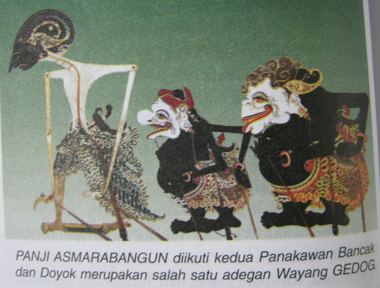 Basa Jawa: wayang Gedog